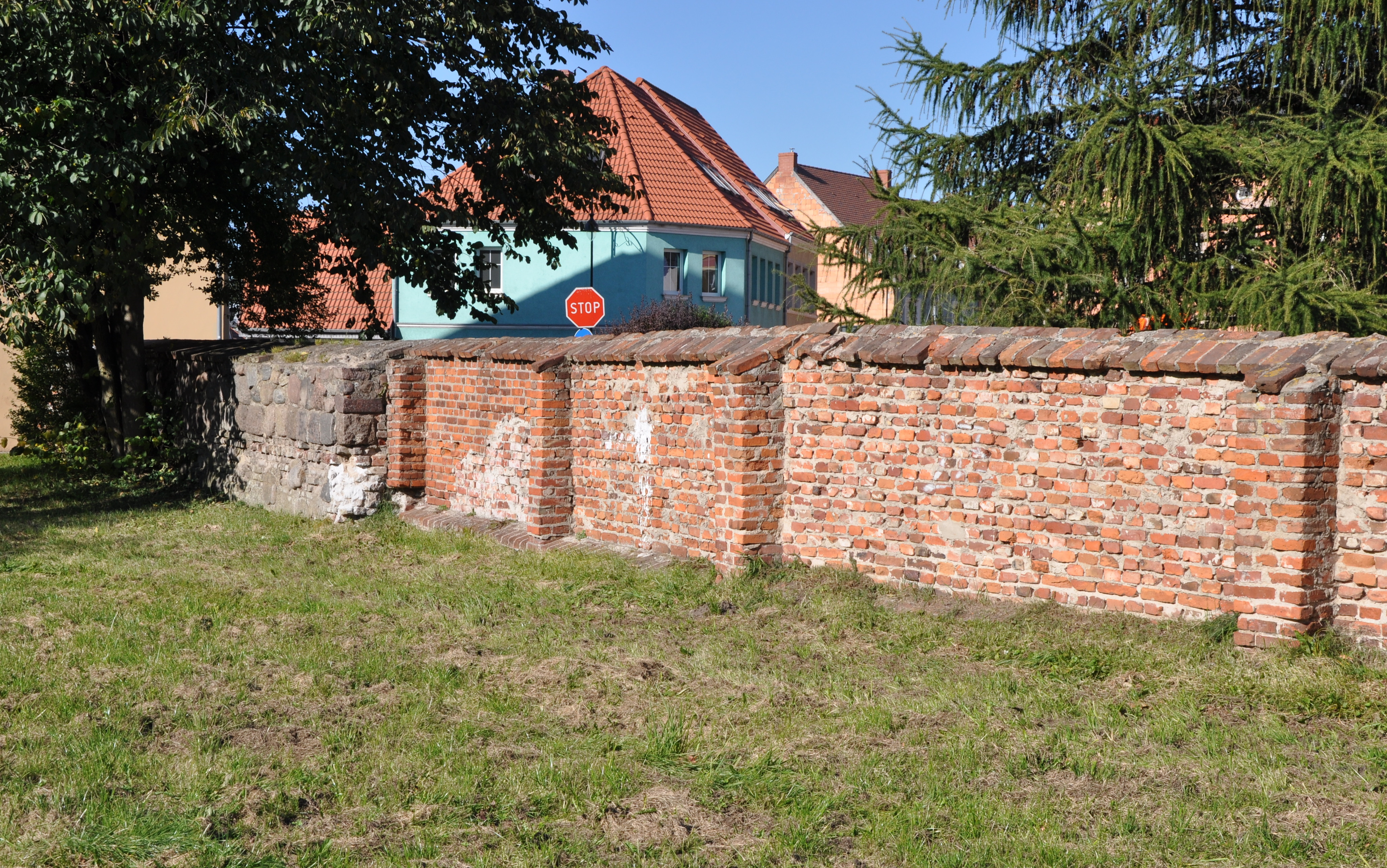 Mury miejskie w Gryficach, przy Bramie Kamieńskiej